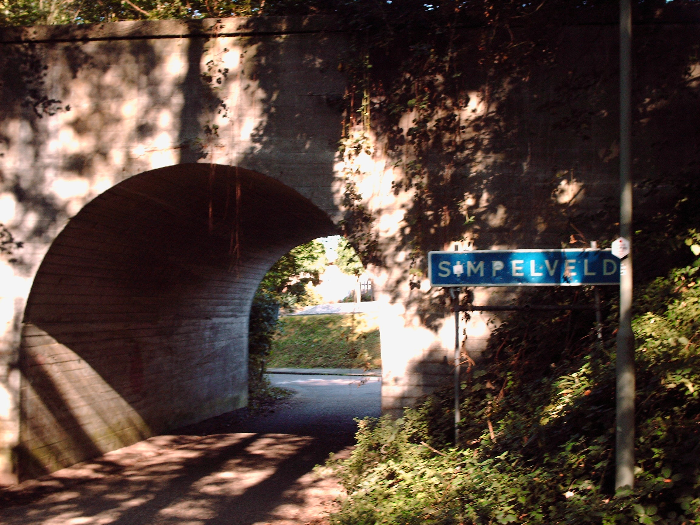 Bord Simpelveld, bij ingang Huize Damiaan. Over deze tunnel loopt het Miljoenenlijntje. Bord Simpelveld, bij ingang Huize Damiaan.